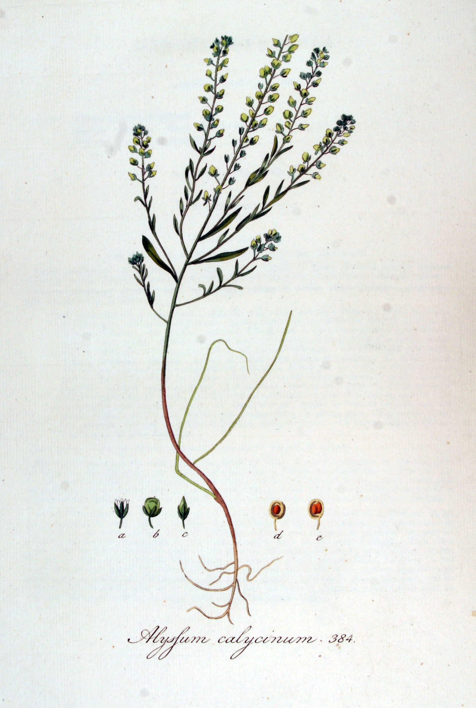 Alyssum alyssoides (L.) L. (Syn. Alyssum calycinum L.)